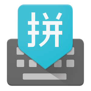 谷歌拼音输入法的新标志